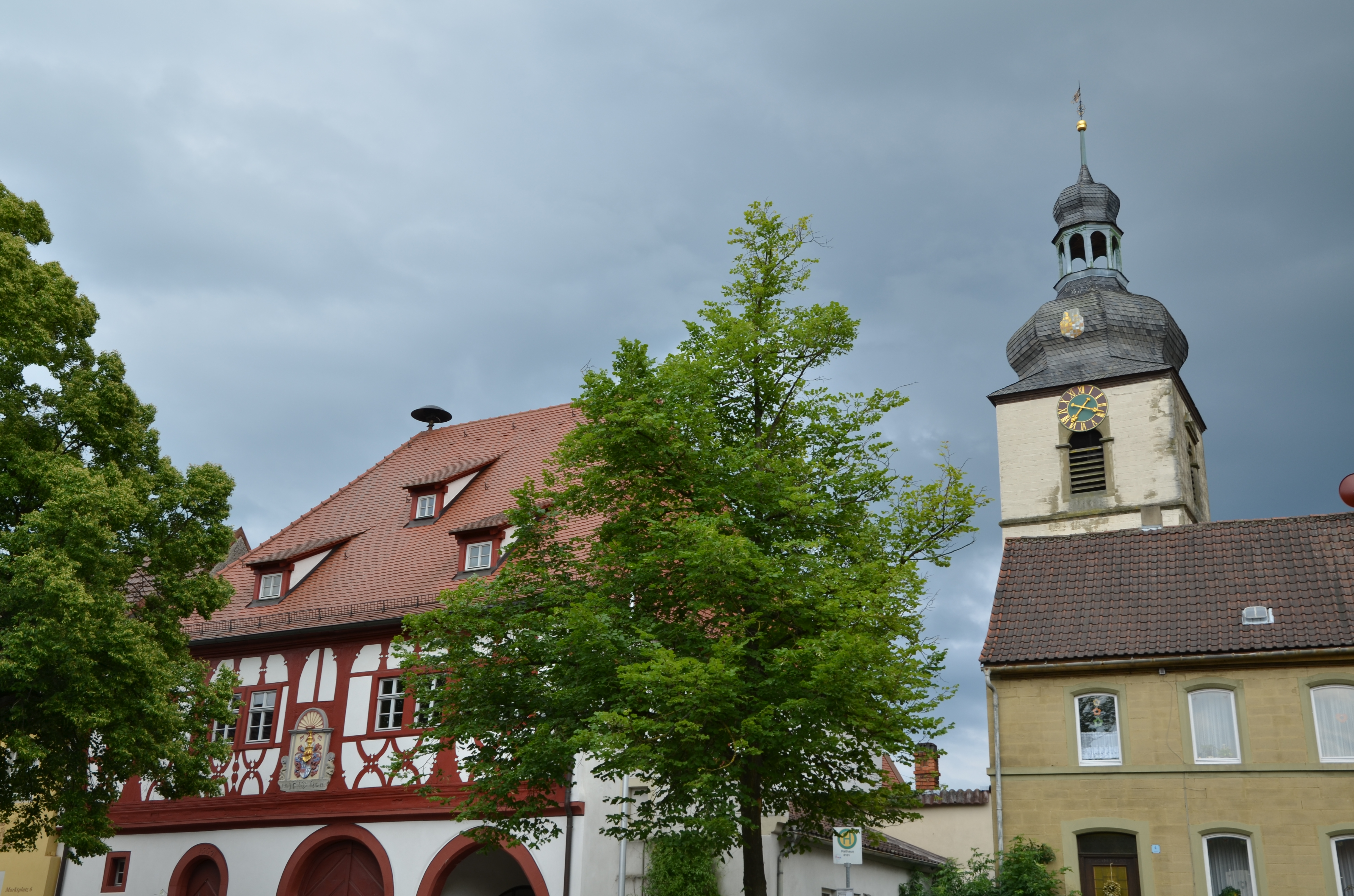 Rathaus und Turm der Kirche St. Matthäus in Markt Einersheim